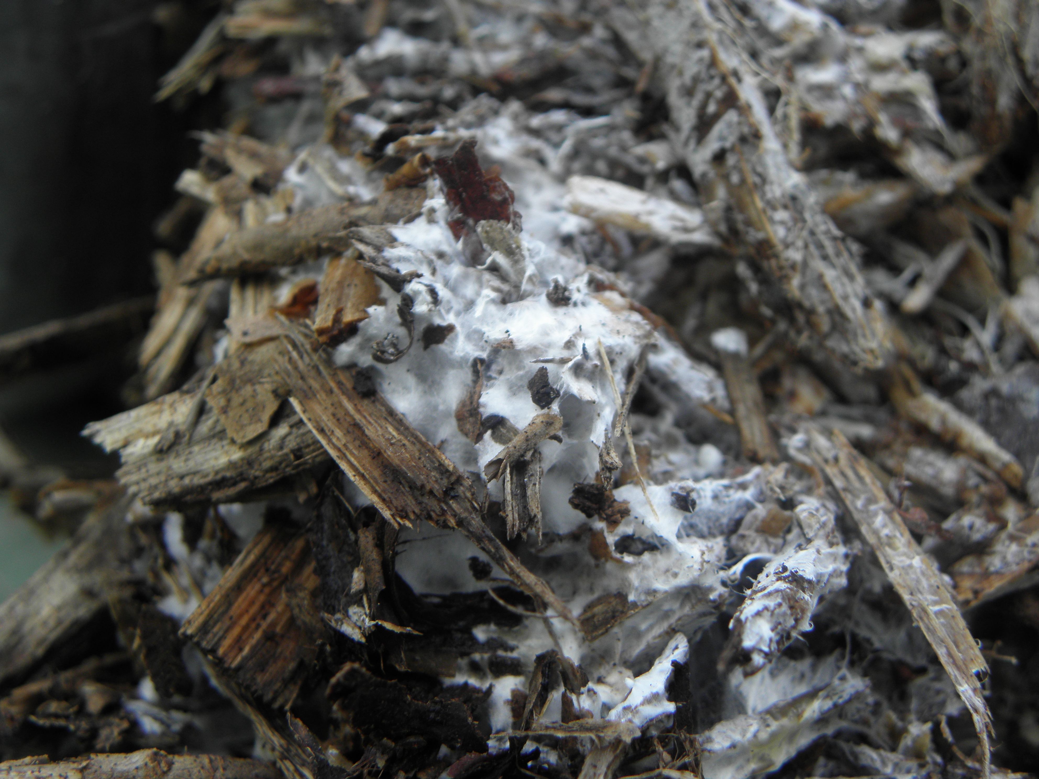 Geaderde leemhoed